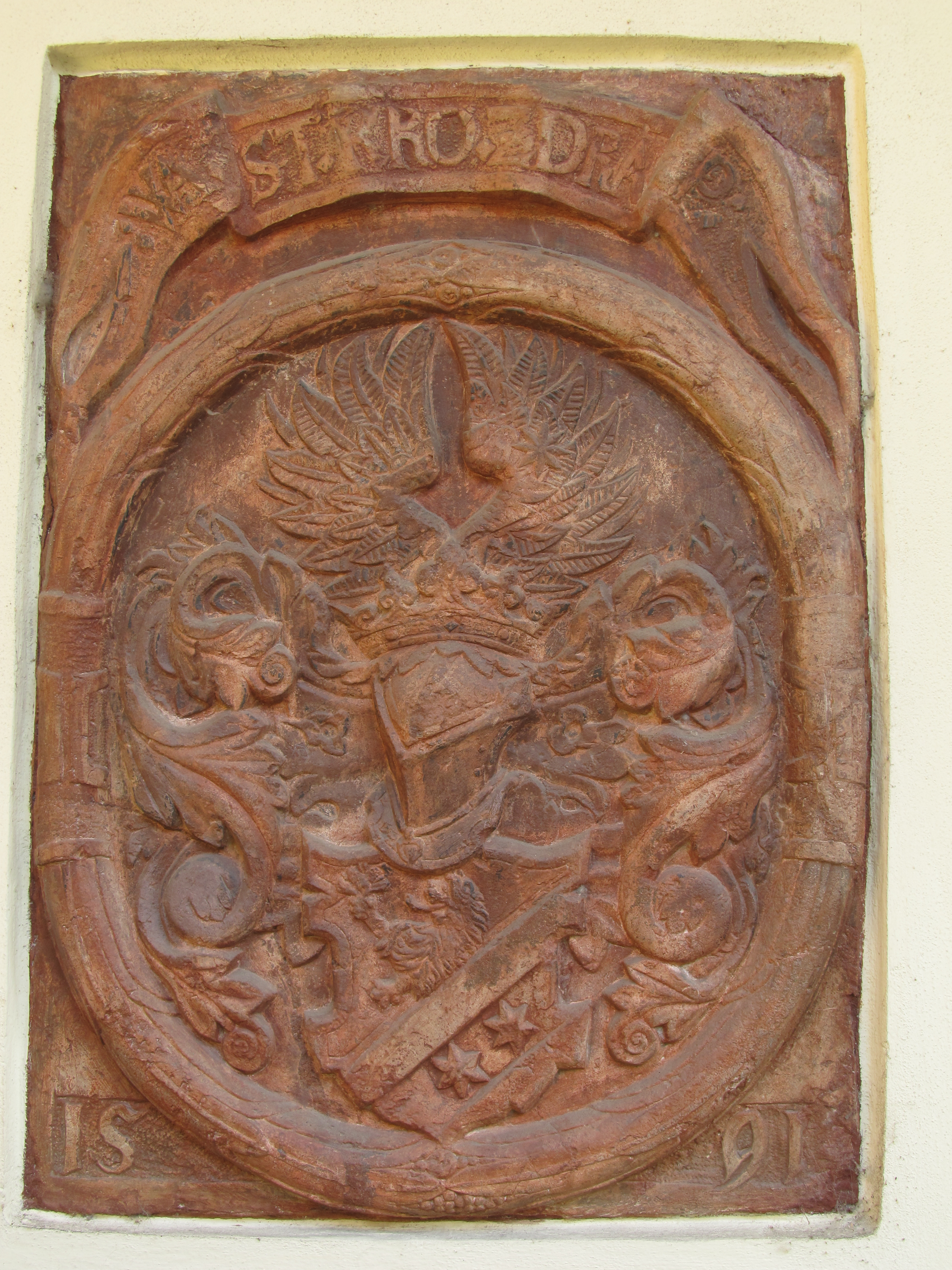 Erb Václava staršího Krocína z Drahobejle ve zdi na pavlači v domě U Halánků.